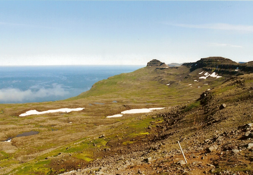 Pass Almenningaskarð auf der Halbinsel Hornstrandir, Westfjorde Islands mit Blick auf die Dänemarkstraße